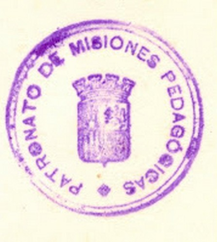 Sello del Patronato de Misiones Pedagógicas, proyecto mixto emprendido por la Institución Libre de Enseñanza y el Gobierno de la II República Española, entre 1931 y 1937.